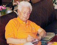 ns Pham Duy